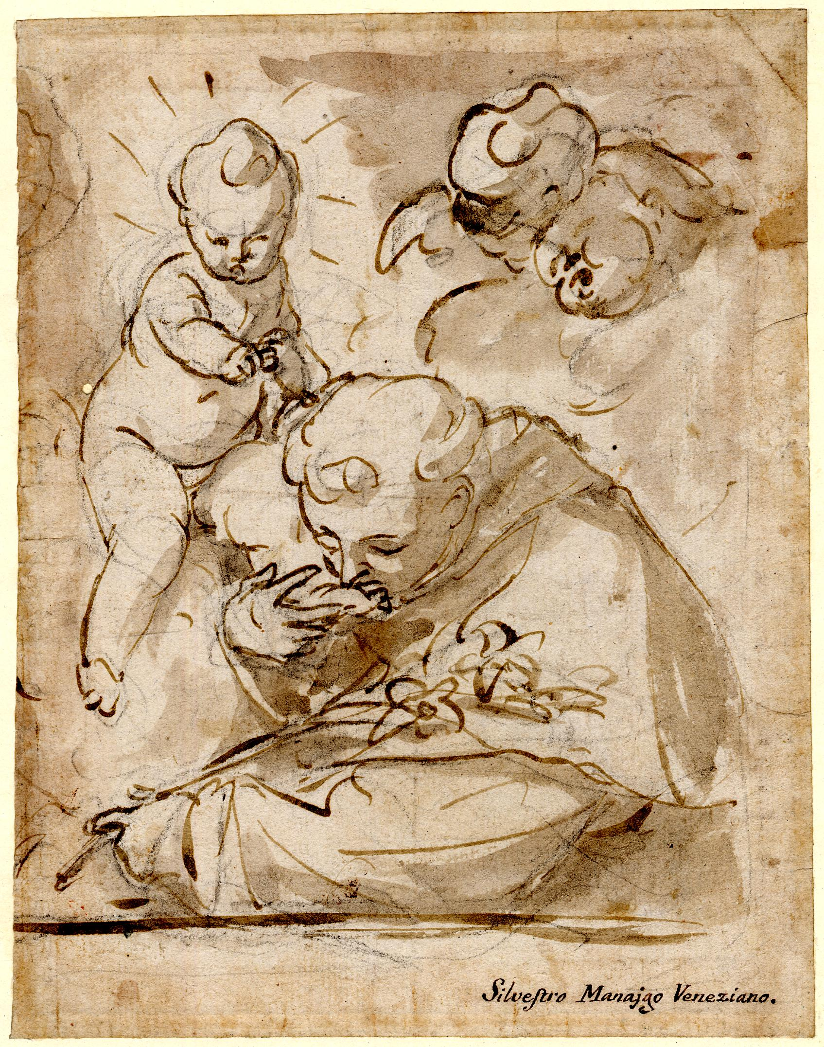 Silvestro Manaigo, Sant'Anyonio da Padova, schizzo